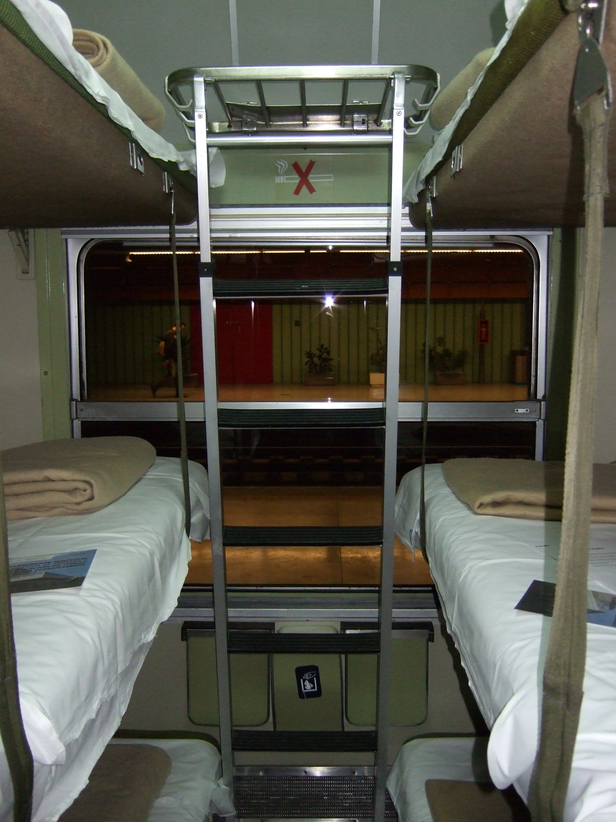 Compartimento de 6 literas del tren Estrella Pio Baroja en la rama Bilbao - Barcelona. 6 beds dorm of the "Estrella Pio Baroja" train on the line Bilbao - Barcelona